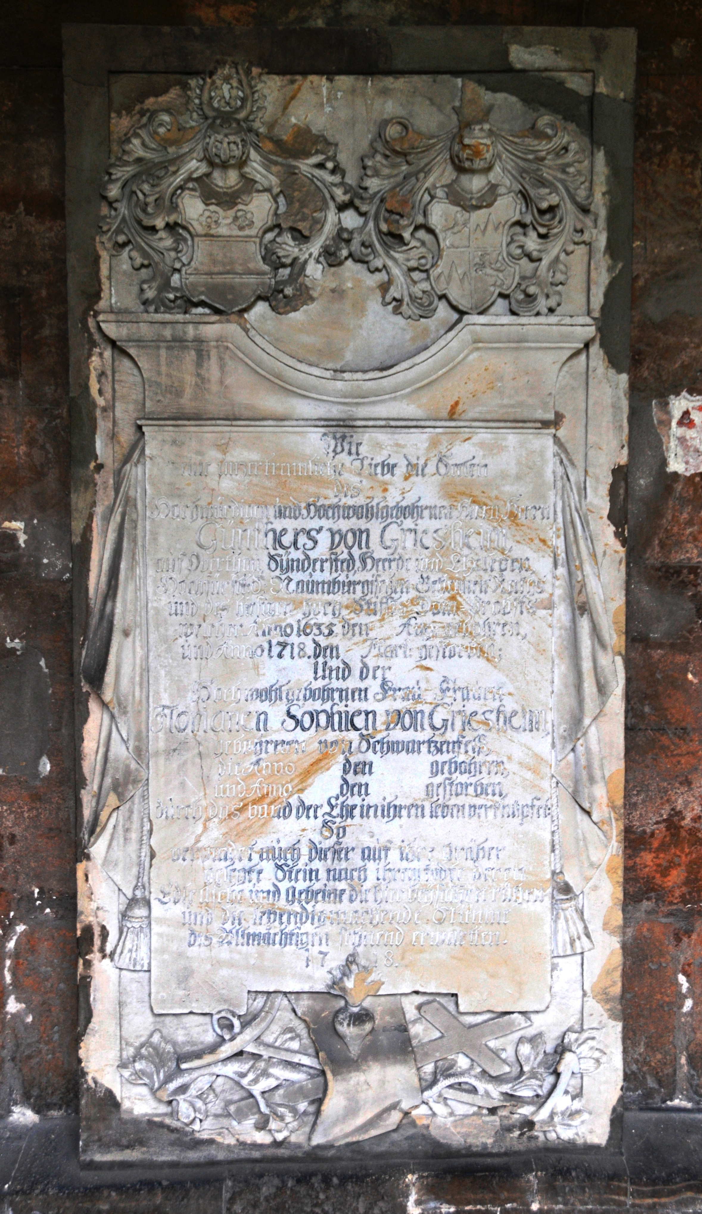 Naumburger Dom, Grabplatte des Günther von Griesheim (18. Jahrhundert)